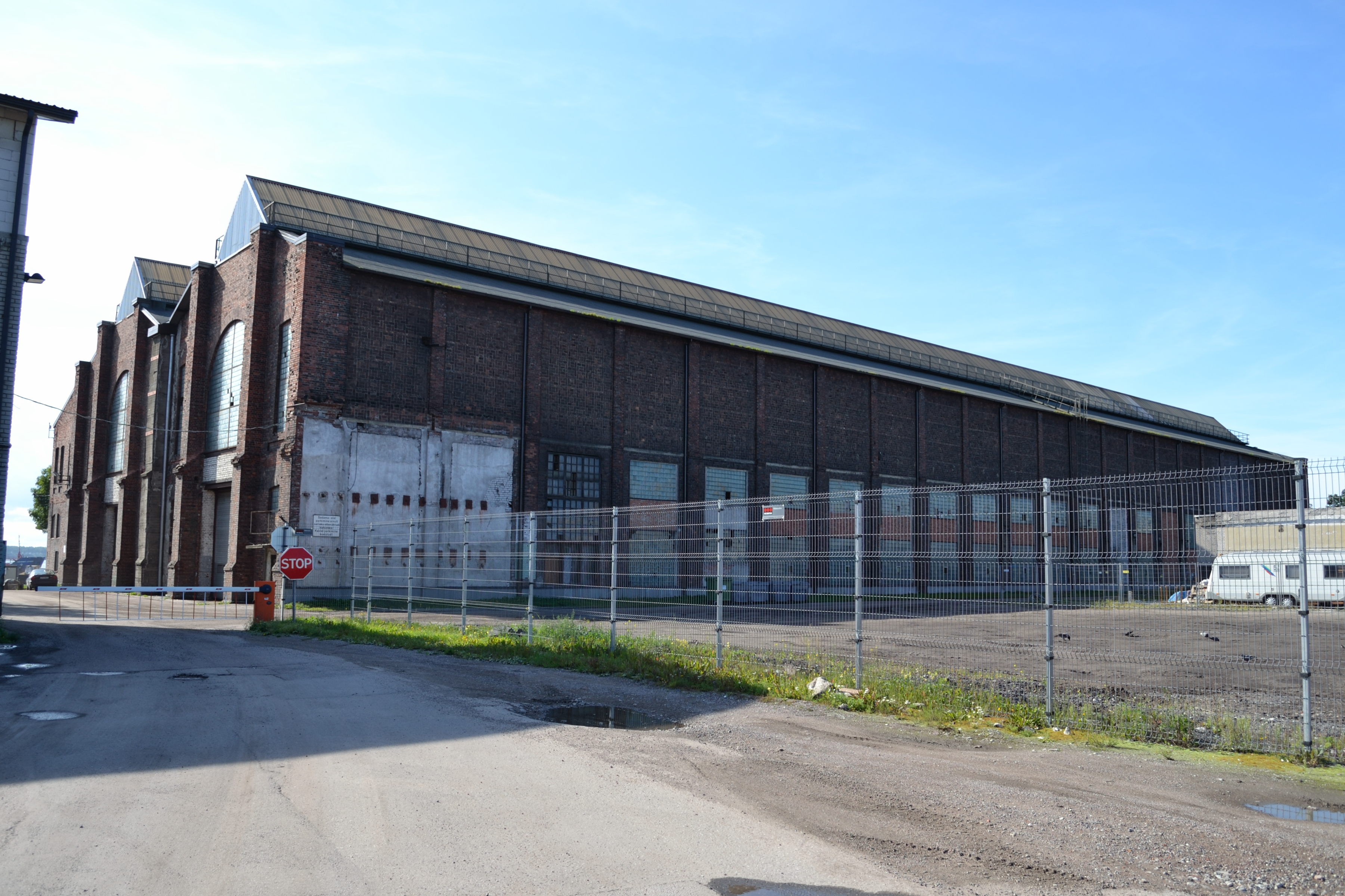 Tallinn, Bekkeri laevatehase mehaanika- ja turbiinitsehh, 1912-1914